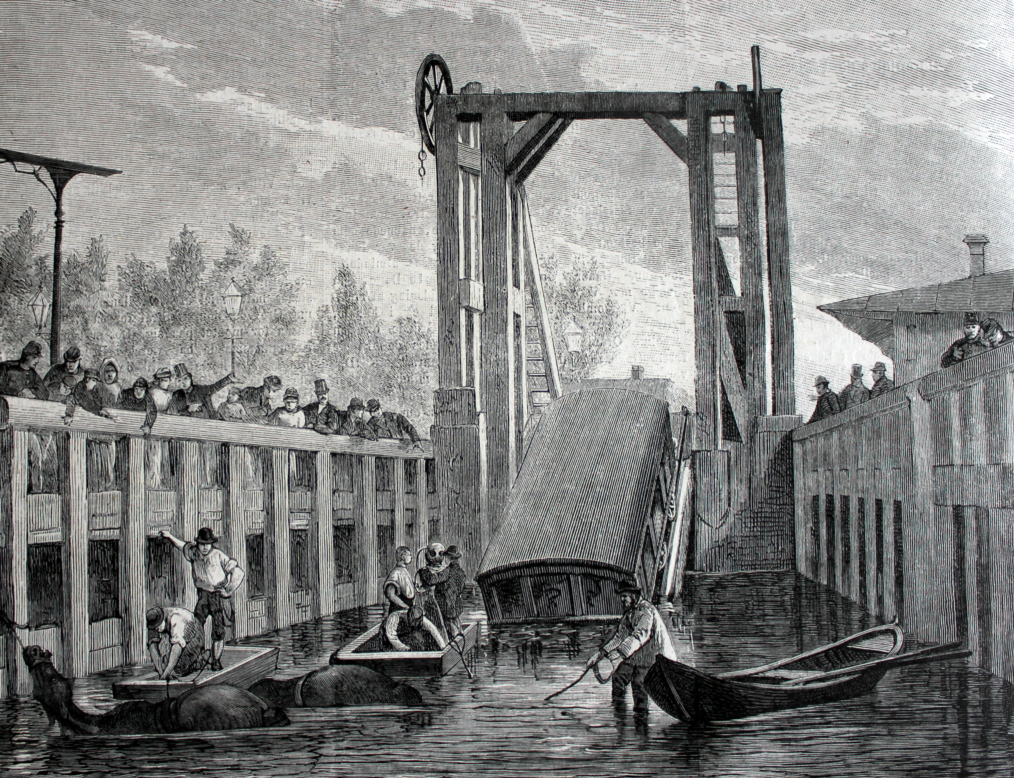 Fra Illustreret Tidende den 3. oktober 1880. Original billedtekst: Jernbane-Katastrofen i Fredericia. Waggonerne optages.